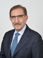 Ritratto Ignazio La Russa